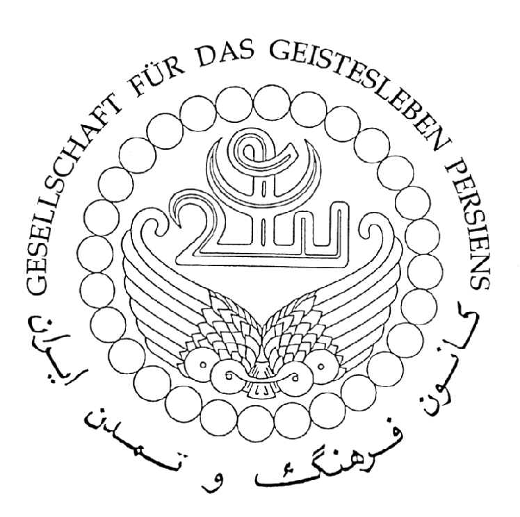 Logo der Gesellschaft für das Geistesleben Persiens